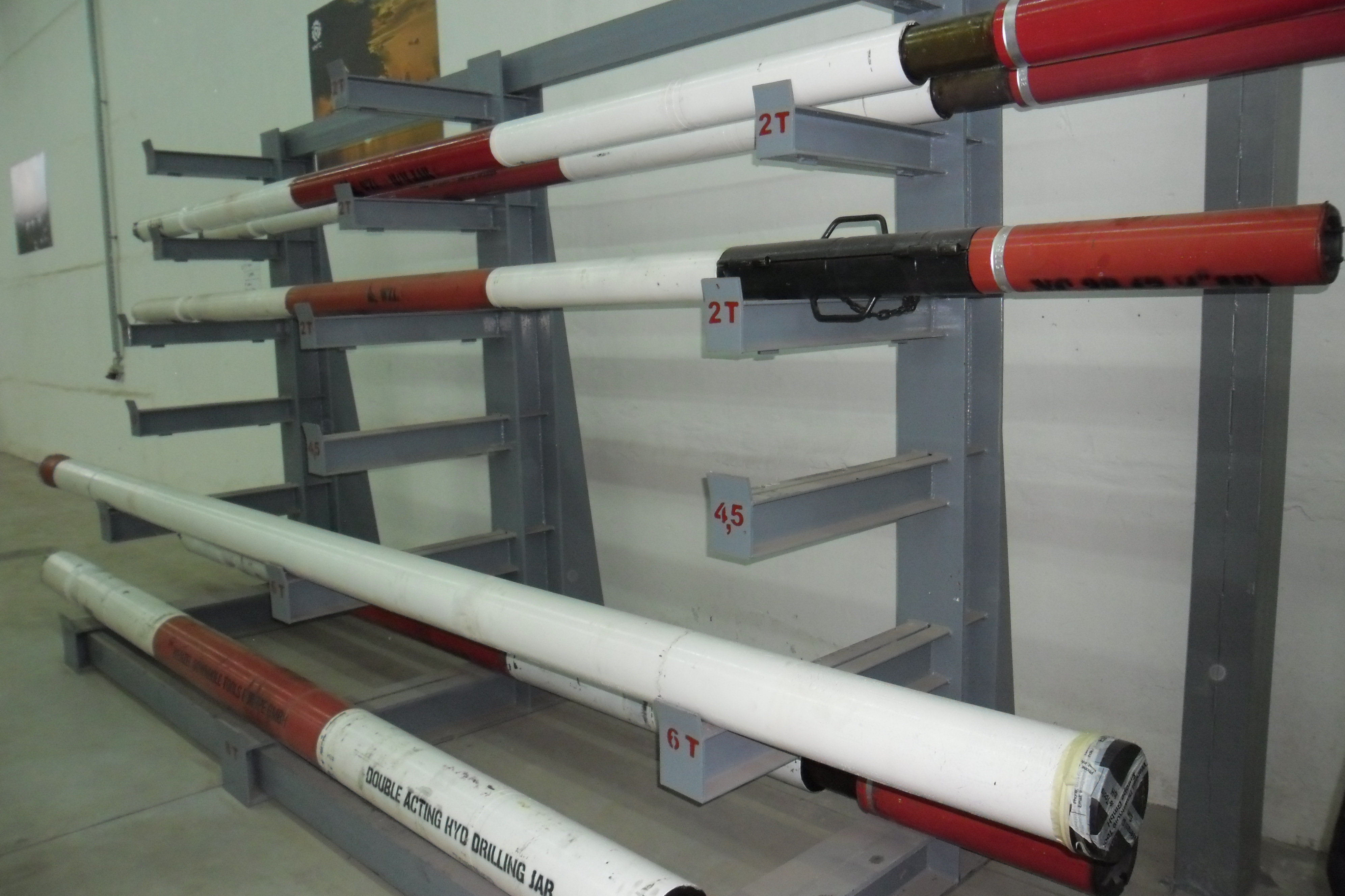 Фото